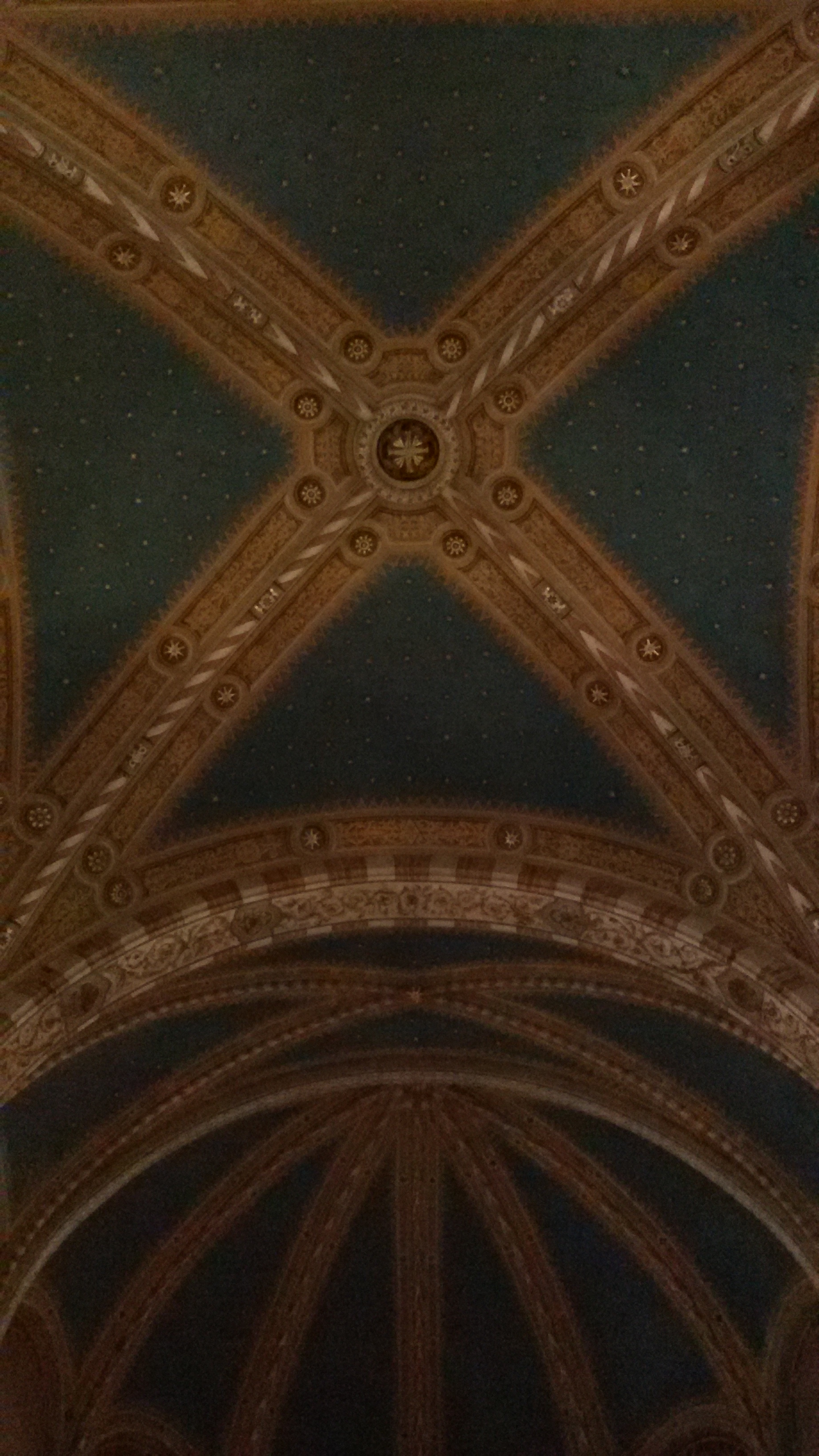 Chiesa di Santa Cristina Quinto di Treviso